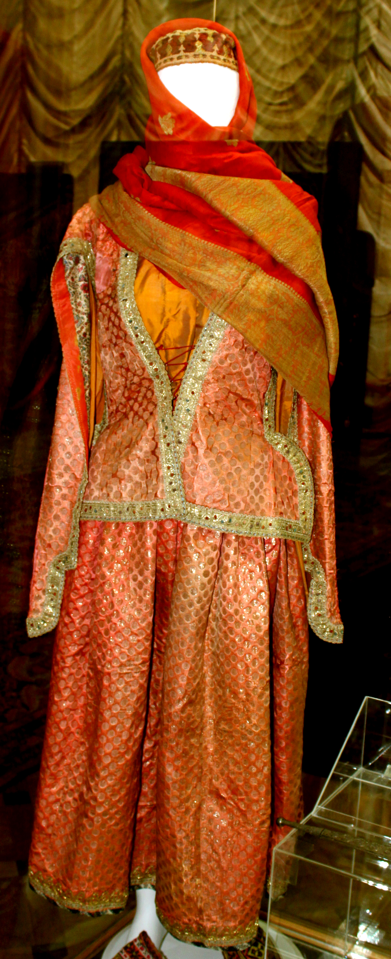 Qarabağ xanlığına məxsus qadın geyimi